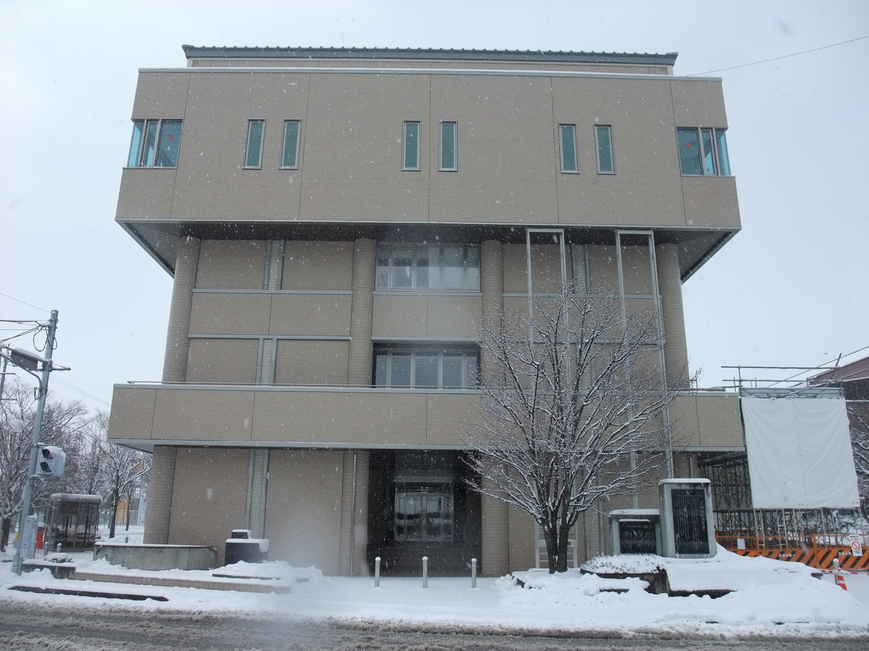 下諏訪町役場の２０１５年に行われた改築後の写真です。